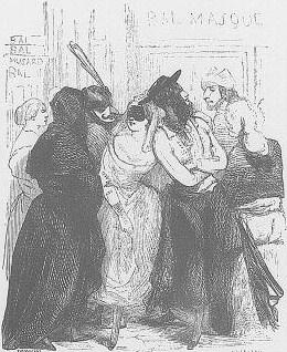 Scène de Carnaval rue Vivienne à Paris.